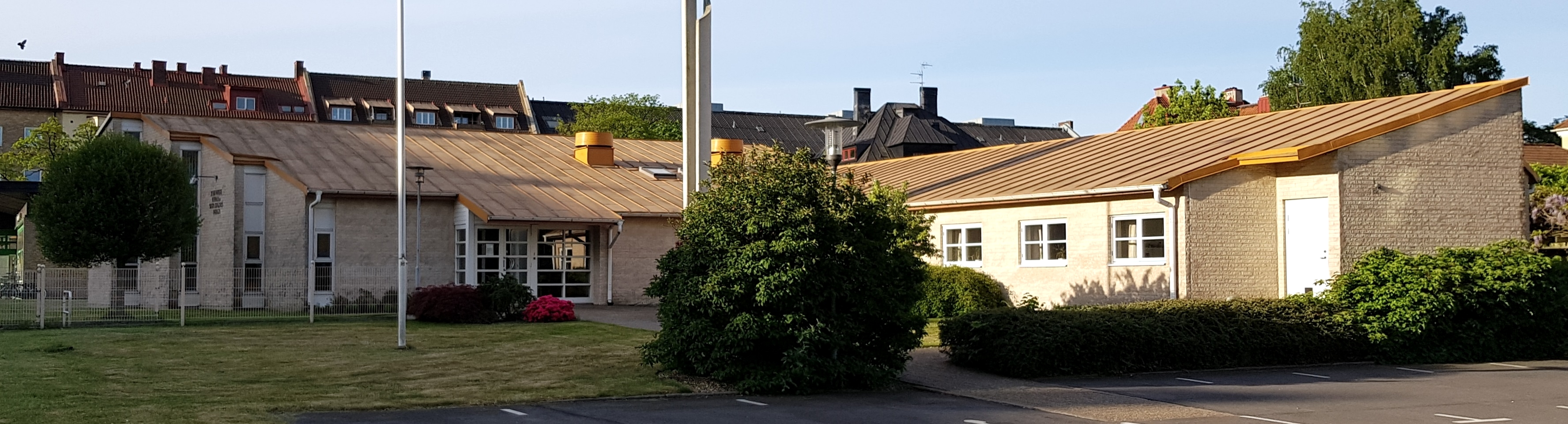 Jesu Kristi kyrka av sista dagars heliga, frikyrkligt samfund (mormonerna) med församlingskyrka på Kopparmöllegatan 9 i Helsingborg. Byggnaden är uppförd 1986–1987 efter ritningar av Sten Ramels arkitektkontor, Stockholm.